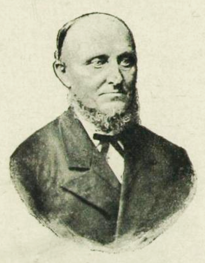 Hornjoserbsce: Jan Bartko (1821–1900); wučer, spisowaćel, basnik, małobyrgarski demokrat.